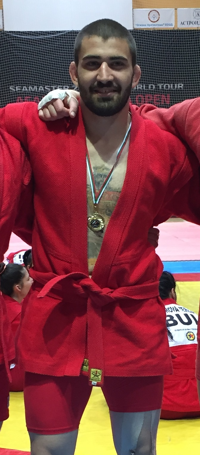 Републиканско първенство в Панагюрище по бойно самбо 2019 година